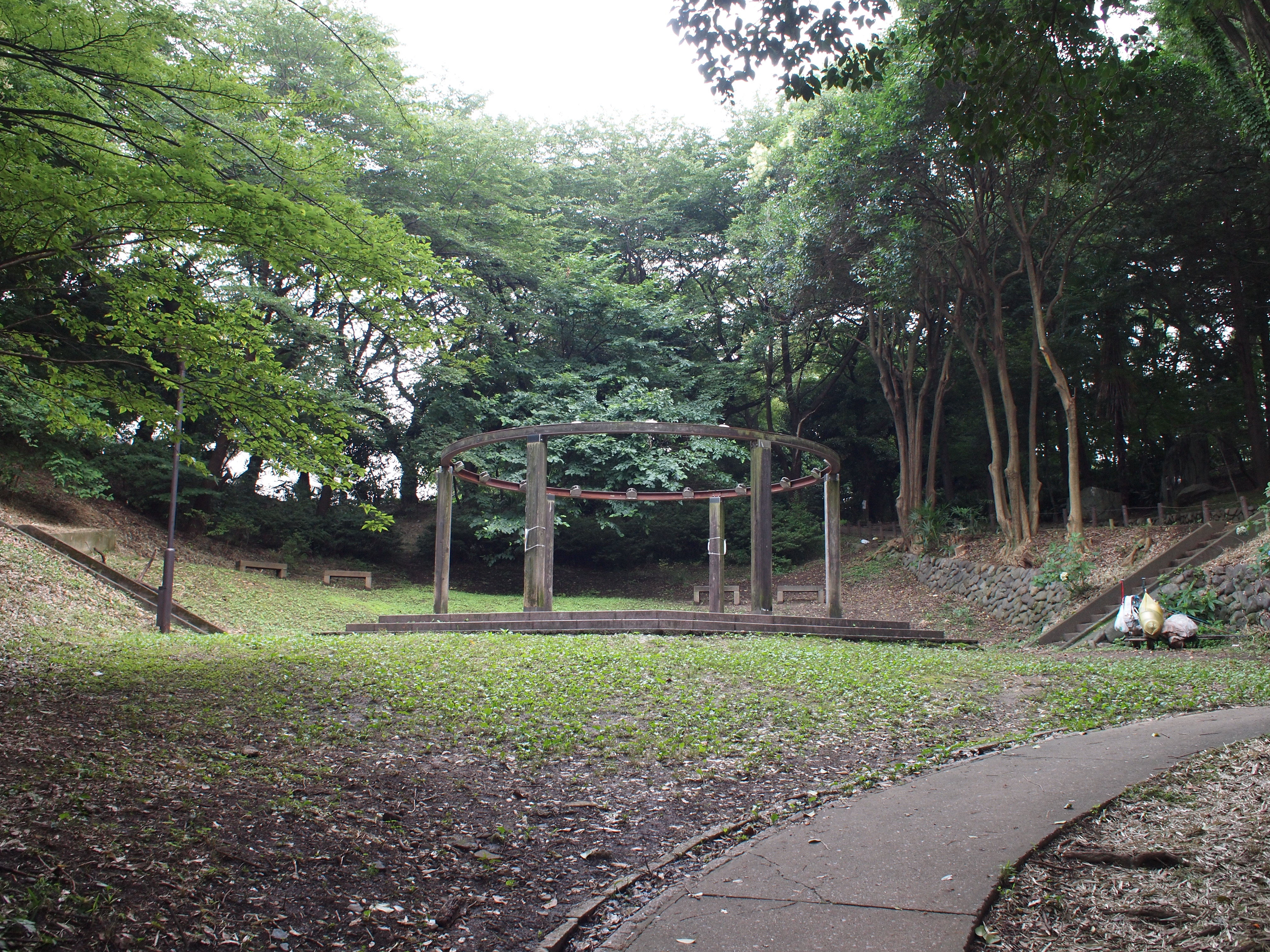 戸山公園。